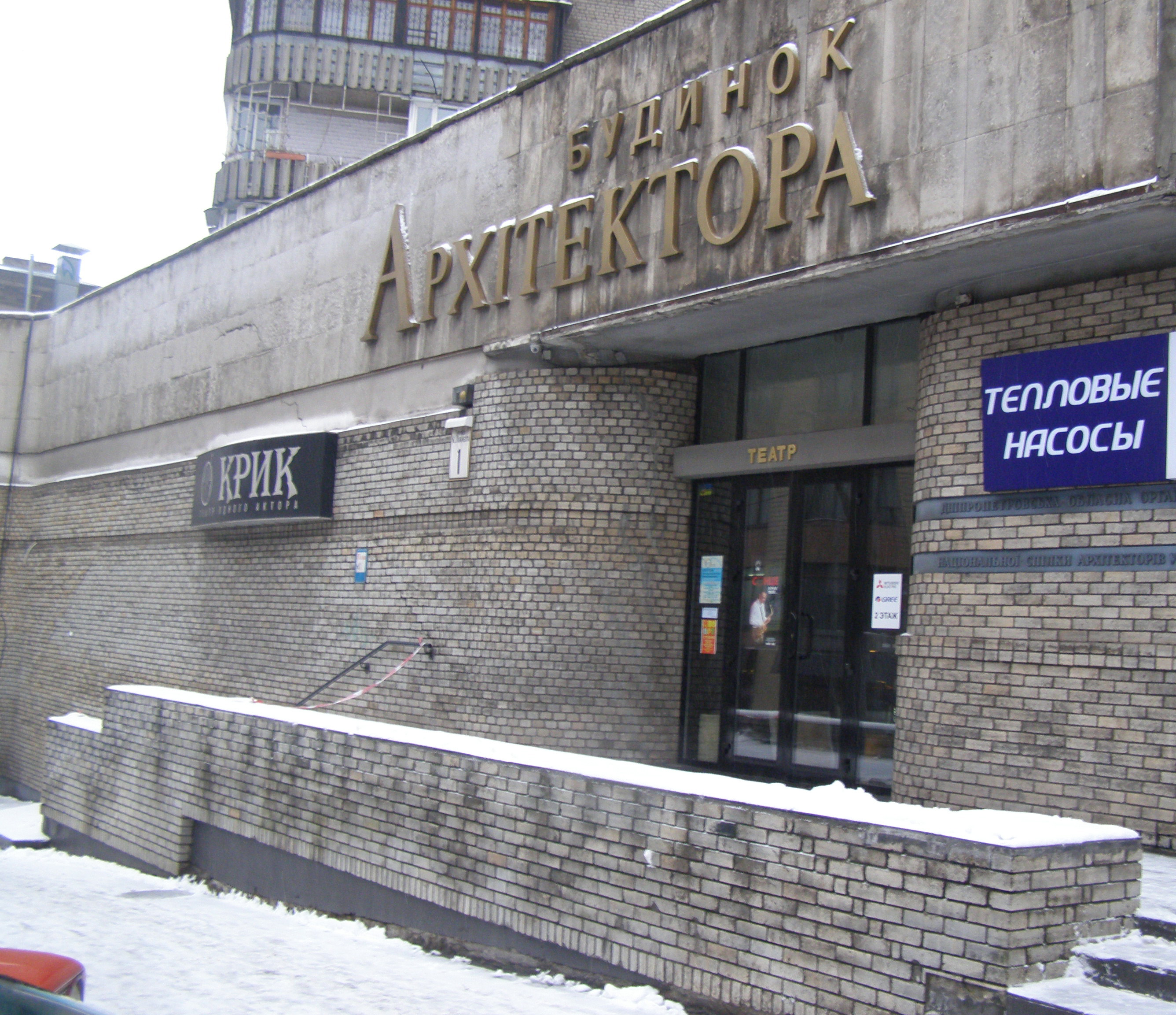 Будинок архітектора (Дніпро), Театр одного актора «Крик»